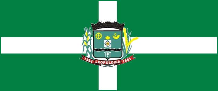 Bandeira do município de Leopoldina, Minas Gerais, Brasil